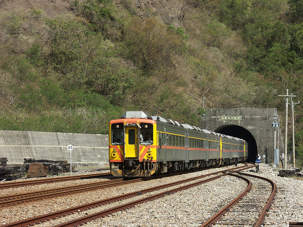 中文（台灣）: 臺灣鐵路管理局DR3100型柴聯車，通過枋野二號隧道。